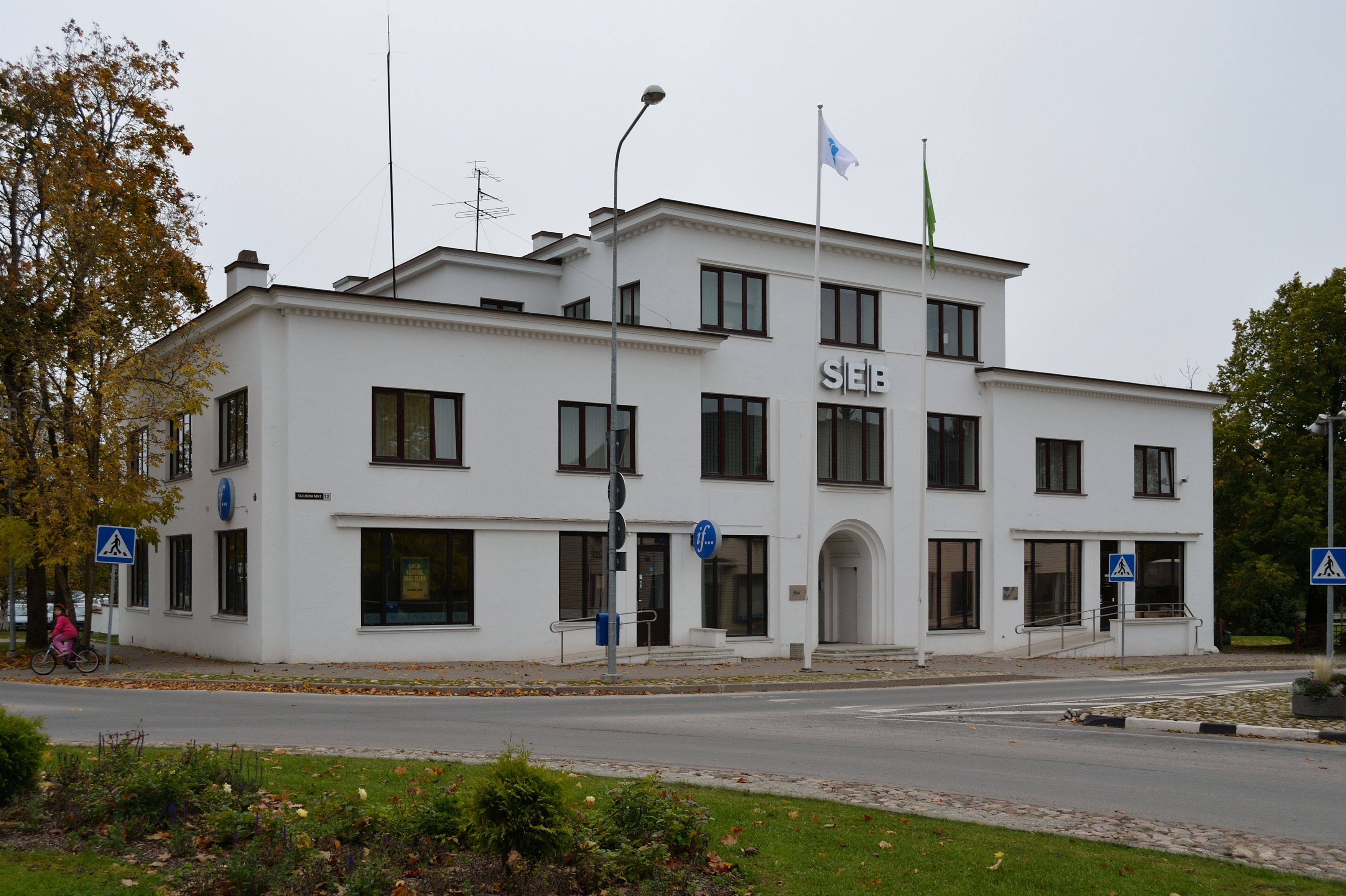 Rapla, pangahoone Tallinna mnt 12